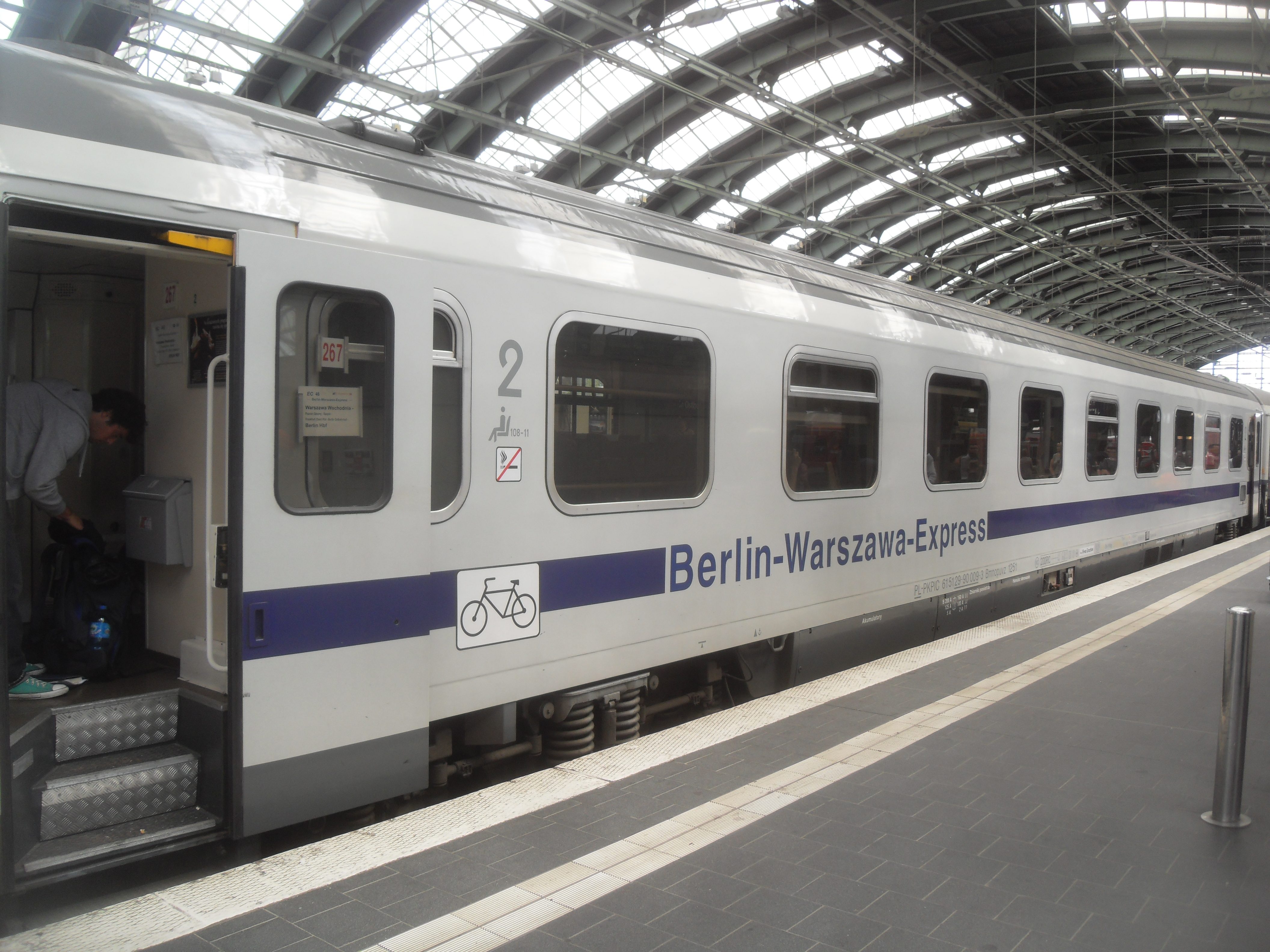 Wagen des Berlin-Warszawa-Expresses im Berliner Ostbahnhof